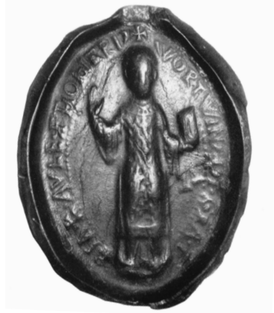 Wortwin (* um 1135; † 1198) war Kanoniker in Würzburg, Aschaffenburg und Mainz, von 1172 - 1180 Protonotar Kaiser Friedrich I.